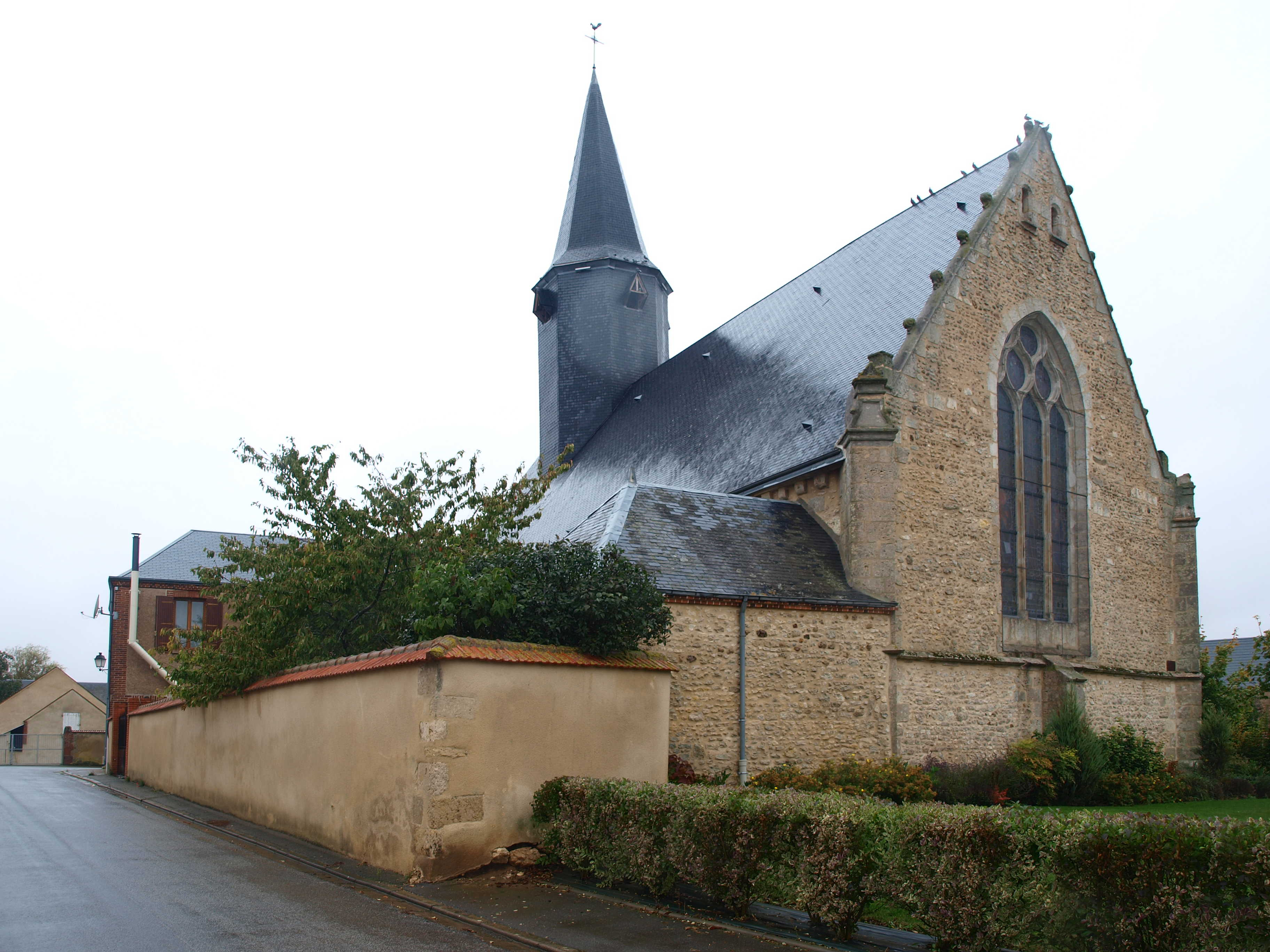 Villiers-Saint-Orien (Eure-et-Loir, France) : église.